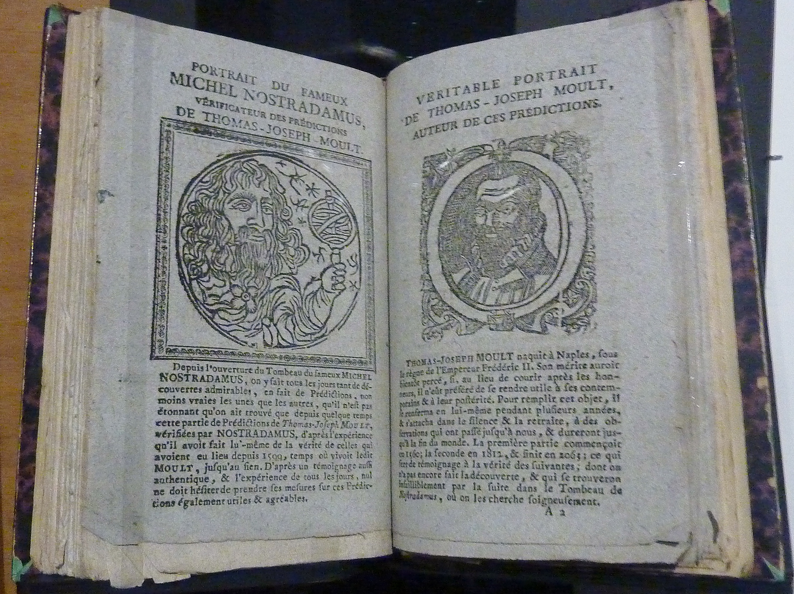 "Prophéties perpétuelles très anciennes et très certaines" par Maurent Lecrène-Labbey (1811-1860), imprimeur à Rouen.